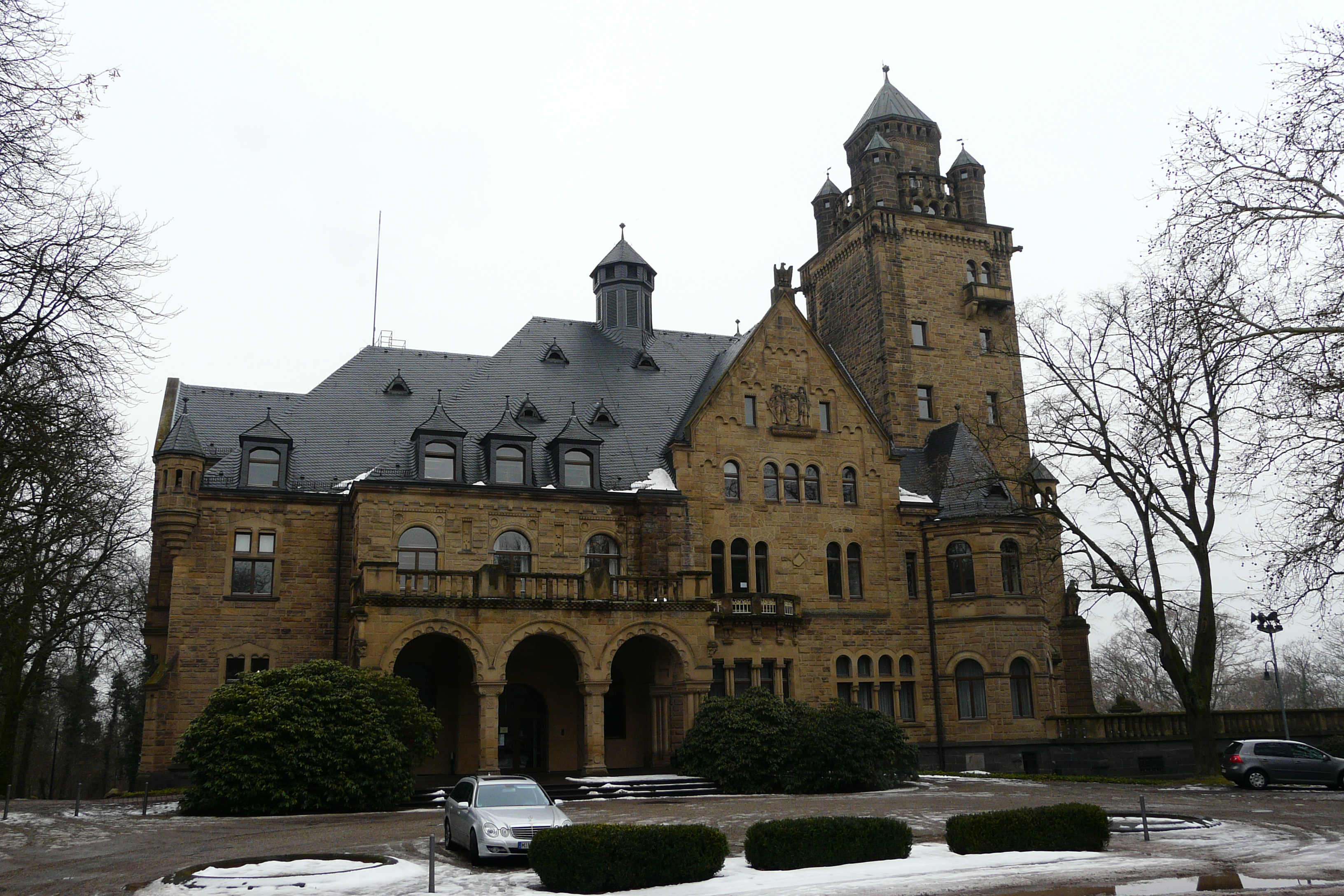 Schloss Waldthausen nahe Budenheim bei Mainz